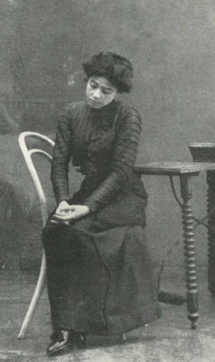 La actriz española Catalina Bárcena en una escena de la obra de teatro La losa de los sueños (1911), de Jacinto Benavente